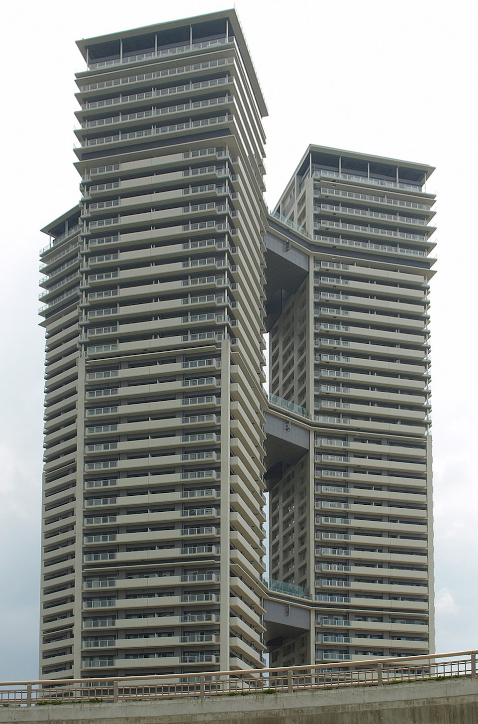 福岡市東区の人工島「アイランドシティ」にあるタワーマンション「アイランドシティ・スカイクラブ」